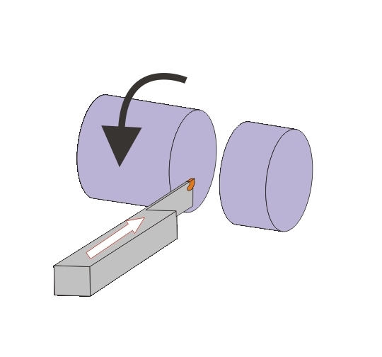 Querabstechdrehen, Version ohne Text